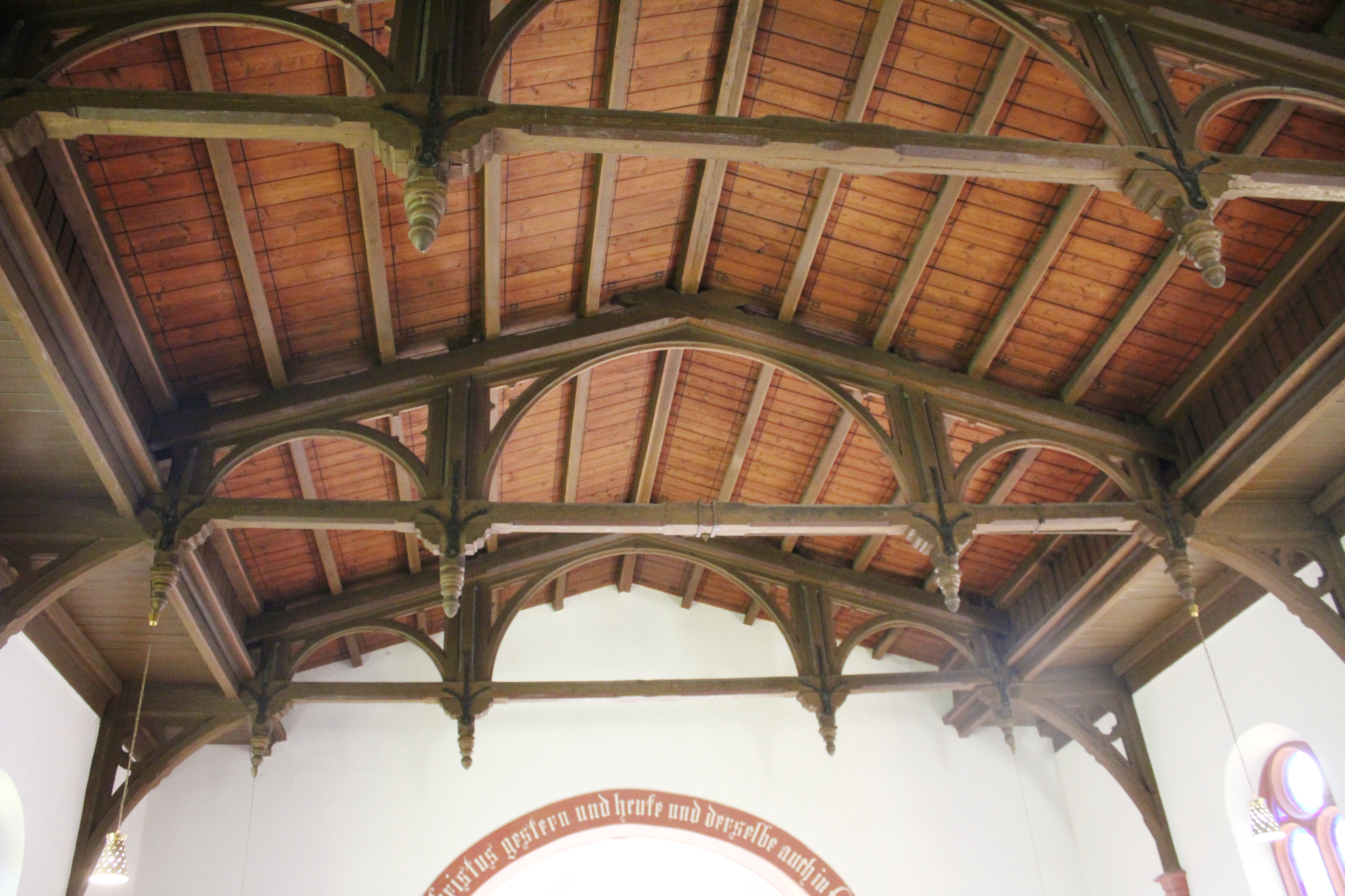 Ev. Kirche Garbenheim, Wetzlar, Lahn-Dill-Kreis, Hessen, Deutschland